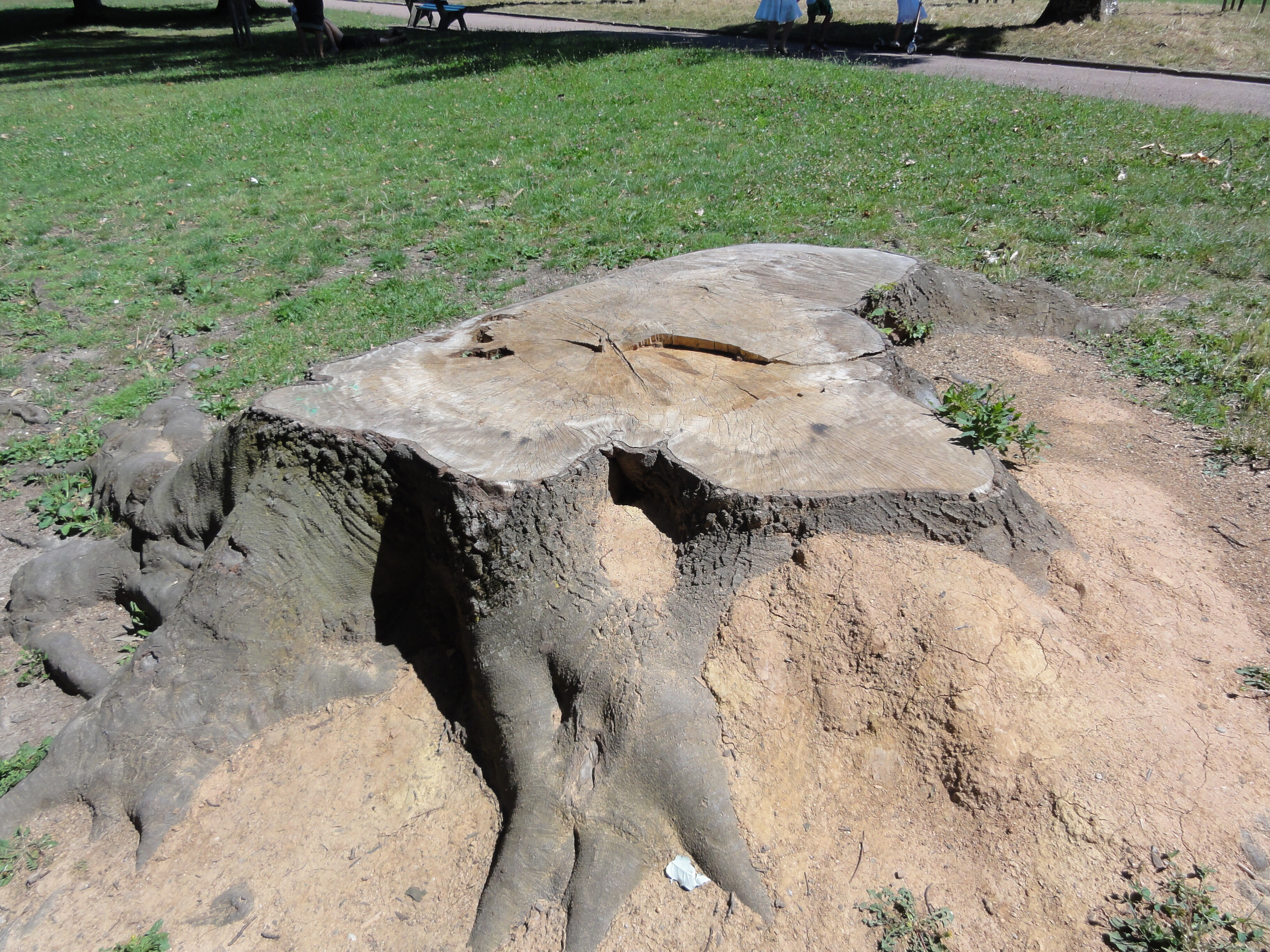 Une trace de la tempête de 1999 - Parc de la Tête d'Or (Lyon)